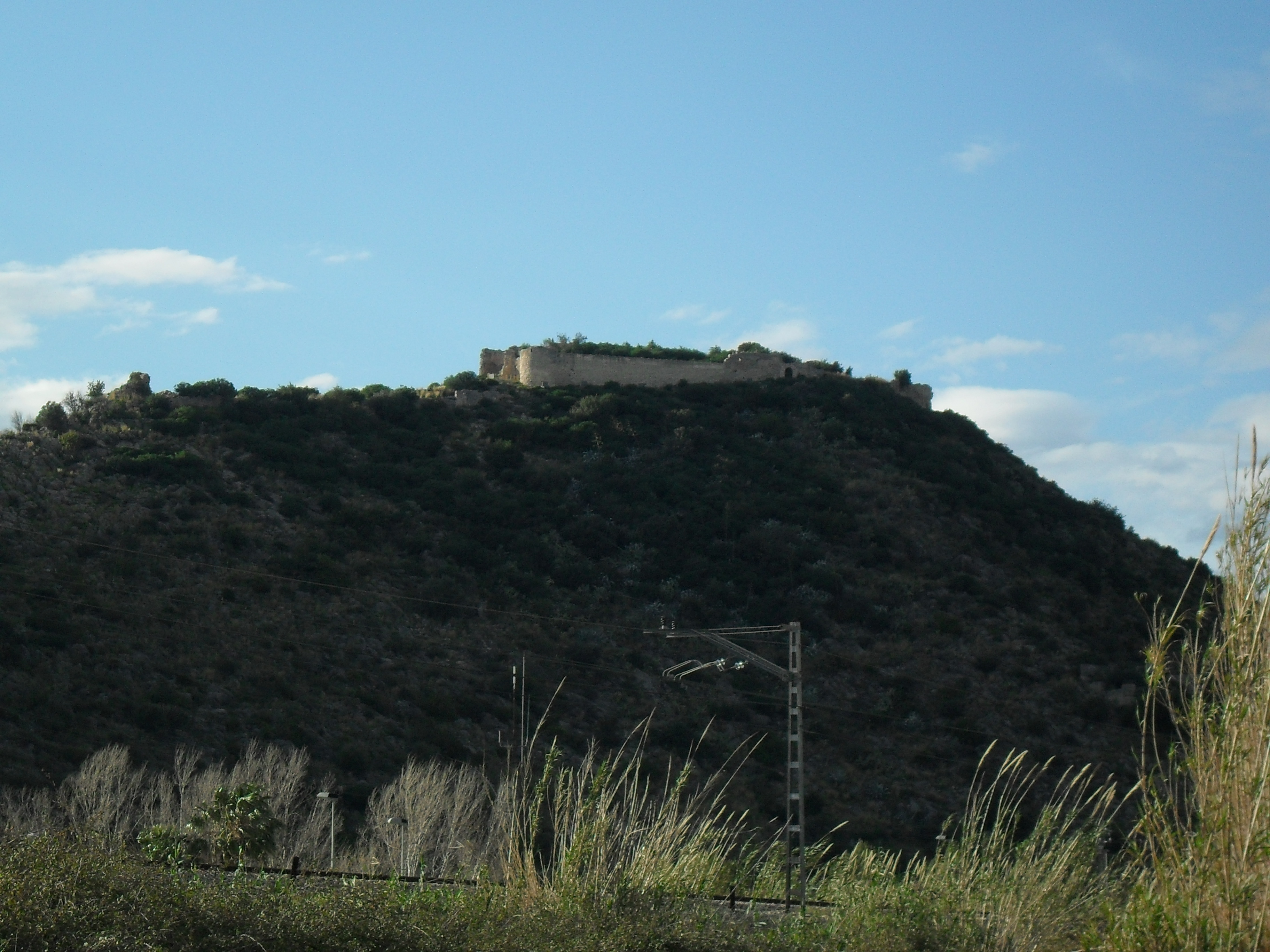 Castillo de Bayrén